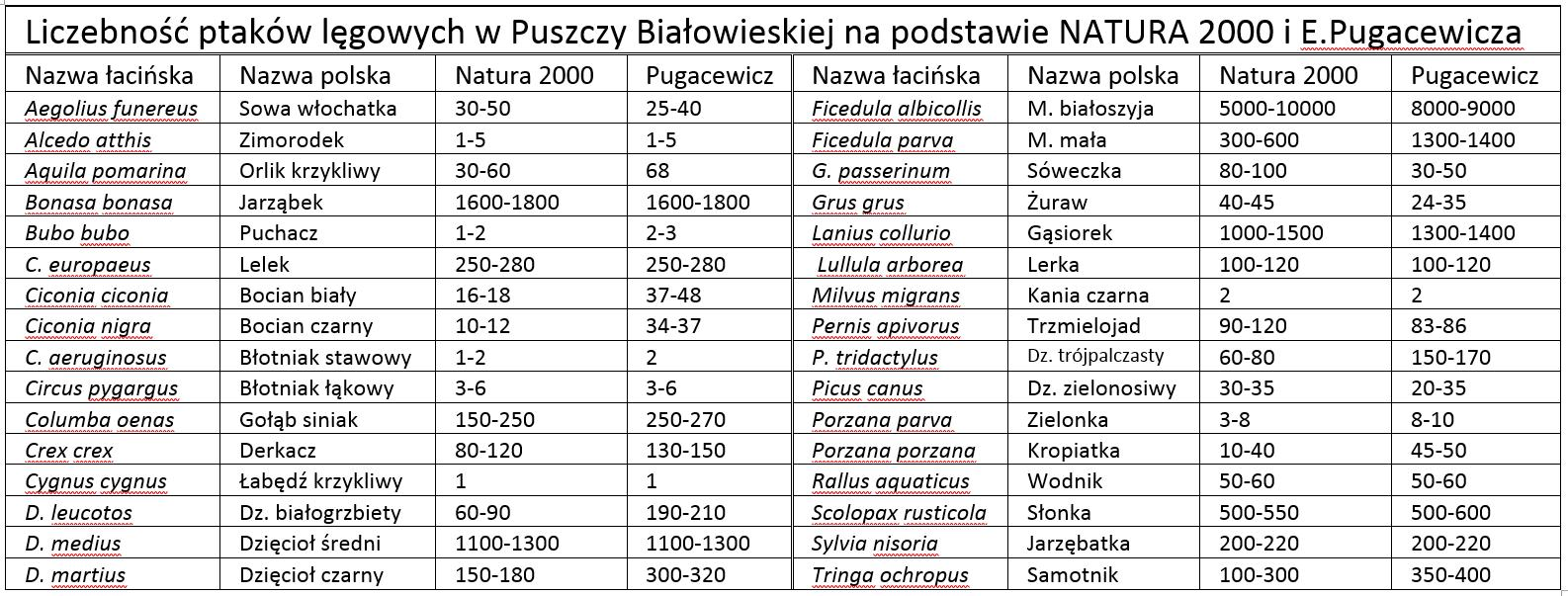 Liczebność gatunków ptaków w Puszczy Białowieskiej na podstawie Standartowego formularza danych - Natura 2000 oraz opracowania E.Pugacewicza "Ptaki lęgowe Puszczy Białowieskiej"